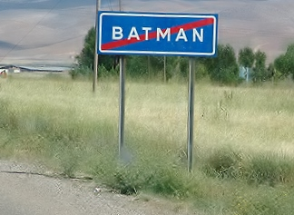 Batman, Turkey